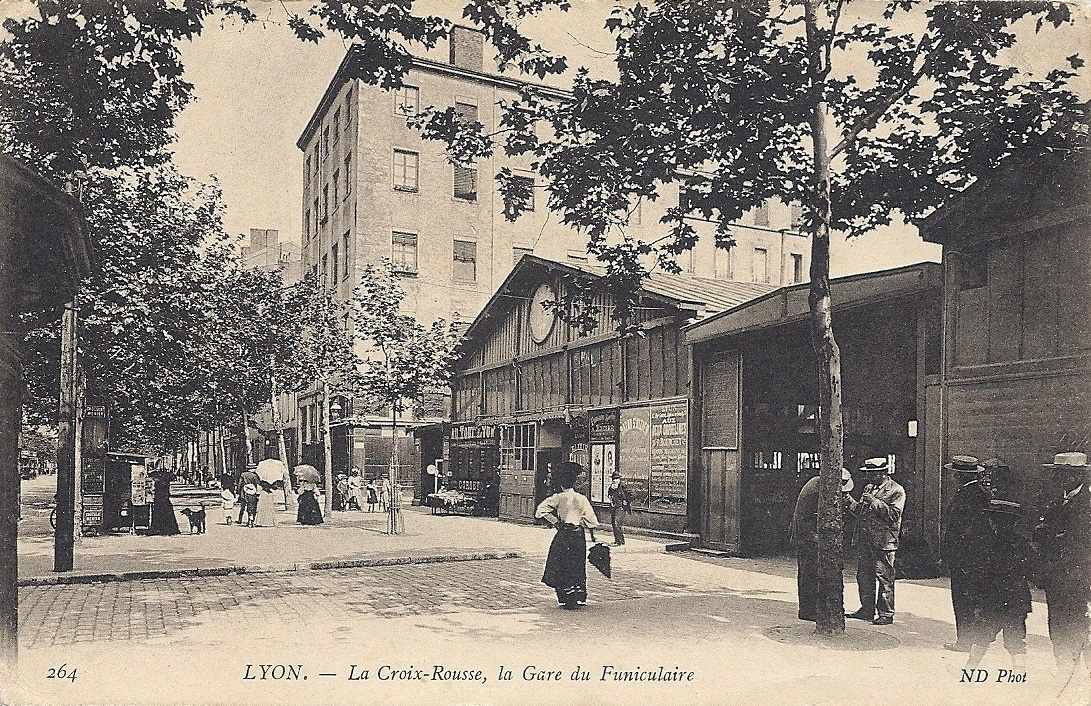 gare haute du funiculaire de la rue Terme, sur le boulevard de la Croix-Rousse, vers 1900